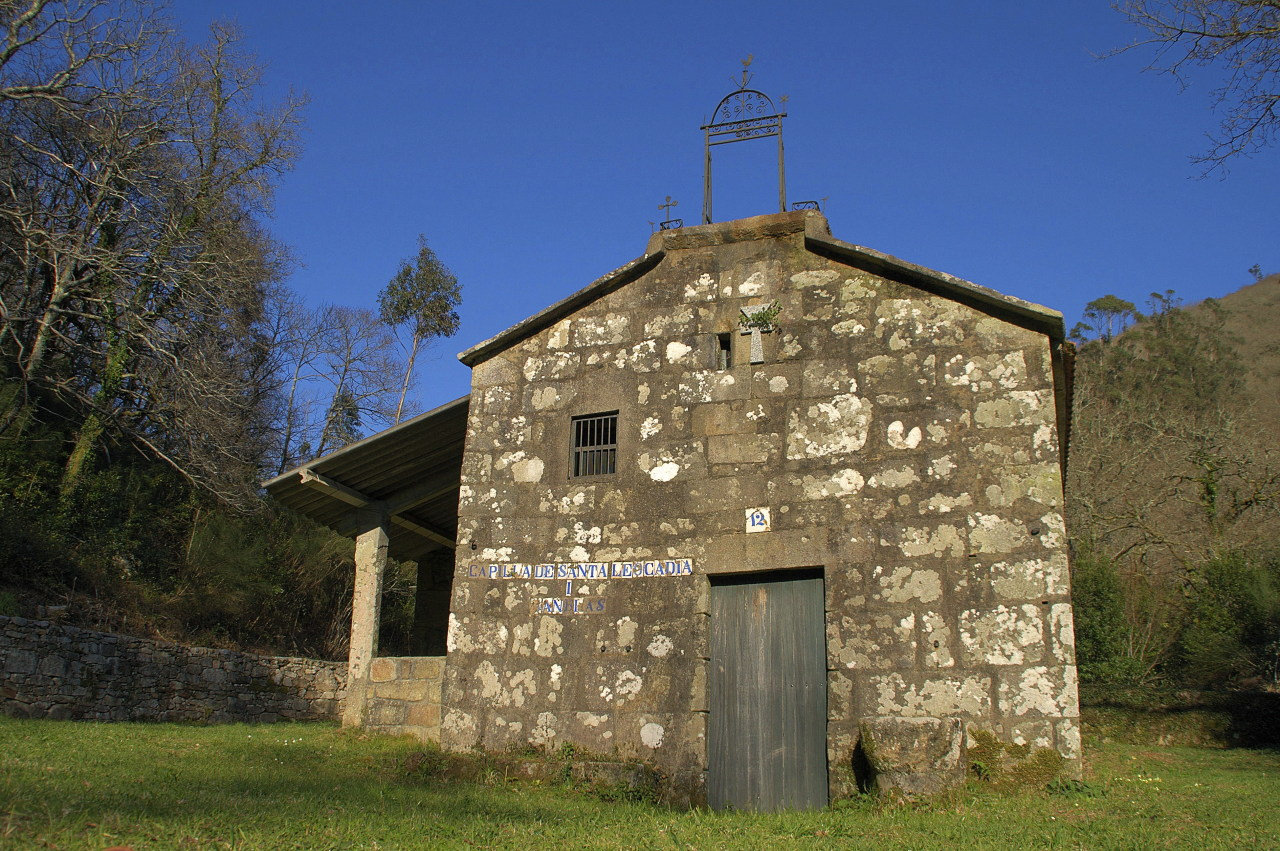 Capela de Santa Leocadia e San Blas, Chacín, Mazaricos